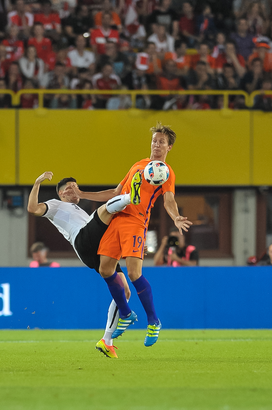 Wien, 4.6.2016, ÖFB Laenderspiel - Österreich vs Niederlande. Bild zeigt Aleksandar Dragovic (AUT) und Luuk de Jong (NED).